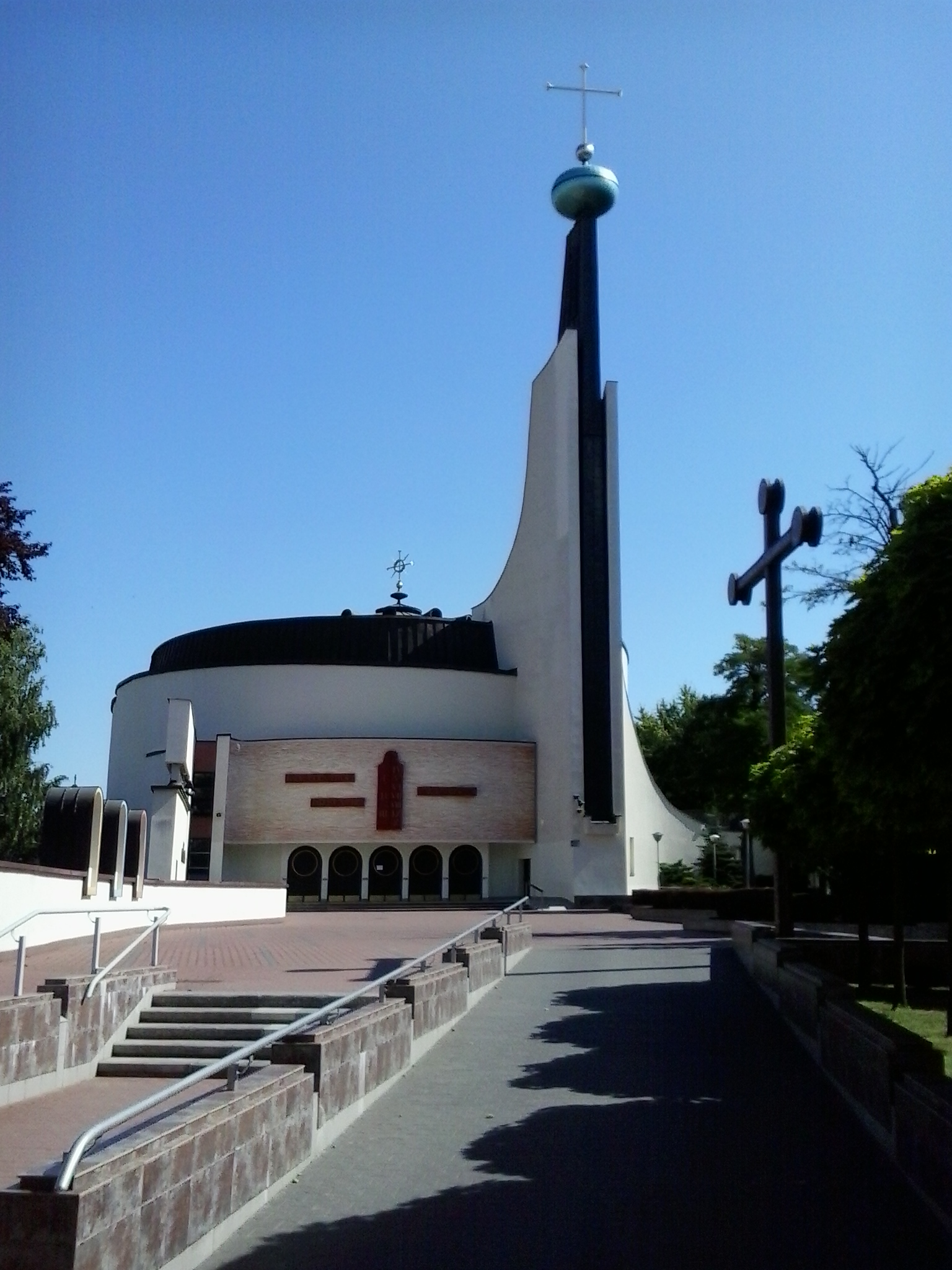 Kościół Św. Rodziny - Poznań, os. Kopernika.